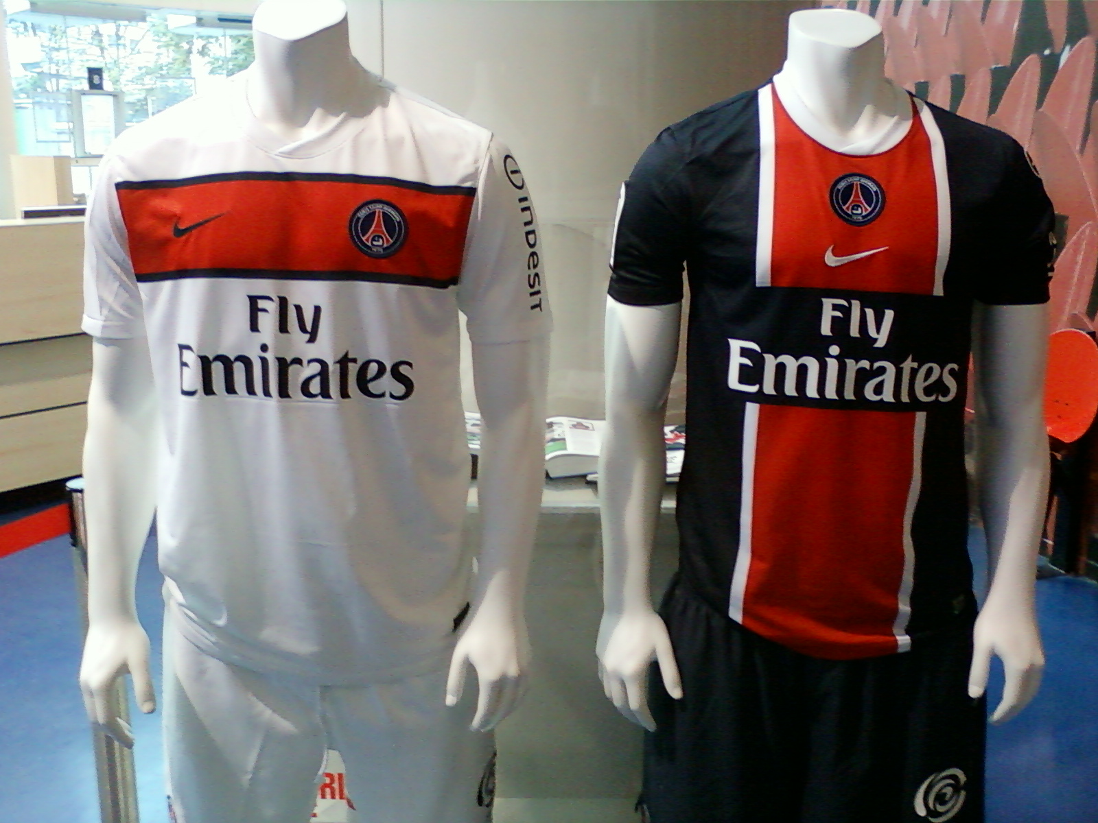 Les maillots officiels du PSG pour la saison 2011-2012 (photo prise à l'Espace Services du Parc des Princes)